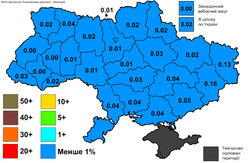 Електоральна підтримка Шкіряка Зоряна Несторовича на виборах Президента України 2014.